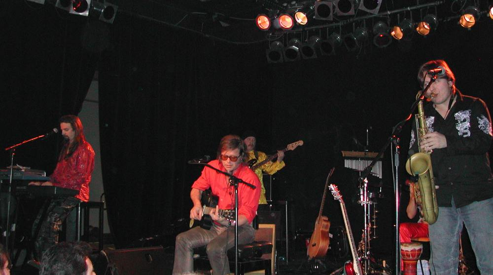 Russian band "Aquarium" live on stage at "Alte Feuerwache" in Mannheim, Germany (December 12, 2004). Photo is made by myself left to right: Boris Rubekin (keyboards), Boris Grebenshikov (guitars, vocals), Vladimir Kudryavtsev (behind Boris Grebenshikov, bass), Oleg Shar (behind Igor Timofeev, percussion), Igor Timofeev (saxophone, flute, guitar) Группа "Аквариум" во время концерта в зале "Alte Feuerwache" в Мангейме (Mannheim), Германия (12 декабря 2004). Фото сделано мной лично слева направо: Борис Рубекин (клавиши), Борис Гребенщиков (гитара, вокал), Владимир Кудрявцев (за Борисом Гребенщиковым, бас), Олег Шар (за Игорем Тимофеевым, перкуссия), Игорь Тимофеев (саксофон, флейта, гитара)